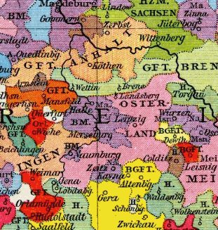 Herrschaftsgebiet der Hochstifte Merseburg und Naumburg-Zeitz um 1250